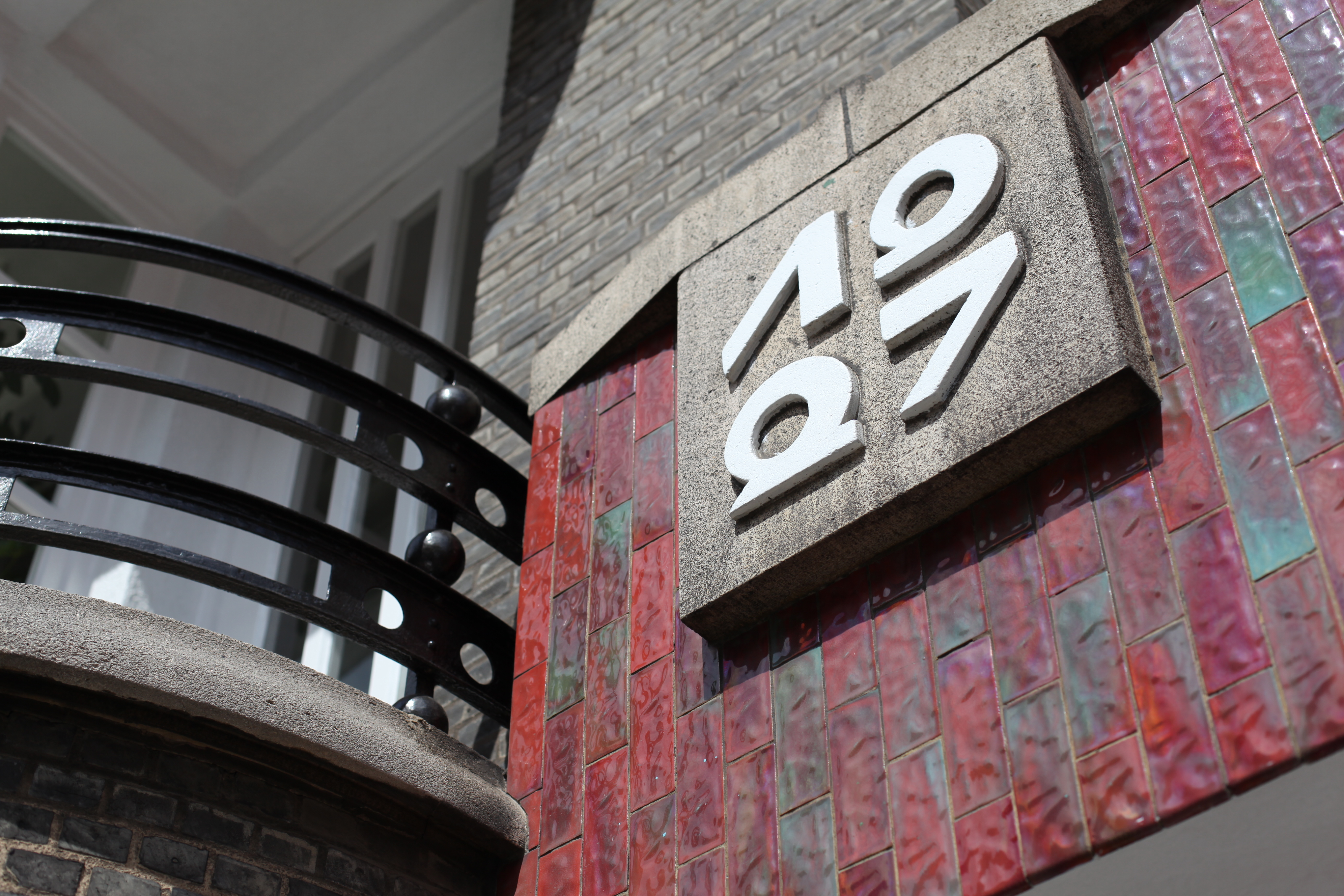 Détail de l'année de construction de cette maison au 174 de la rue Firmin Lecharlier à Jette,Bruxelles